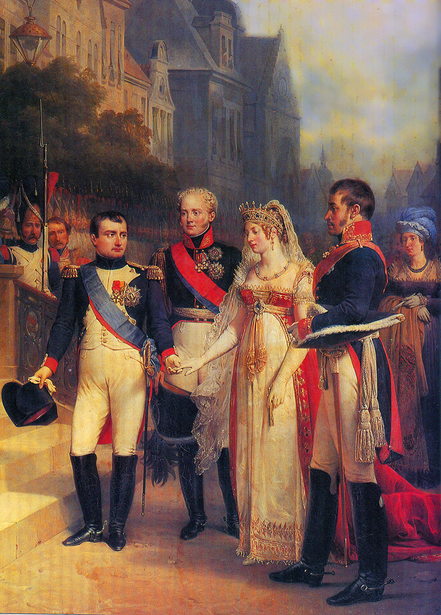 Tilsit (1807) / Тильзитское свидание 1807 г. (слева направо): Наполеон I, Александр I, Луиза Прусская, Фридрих Вильгельм III